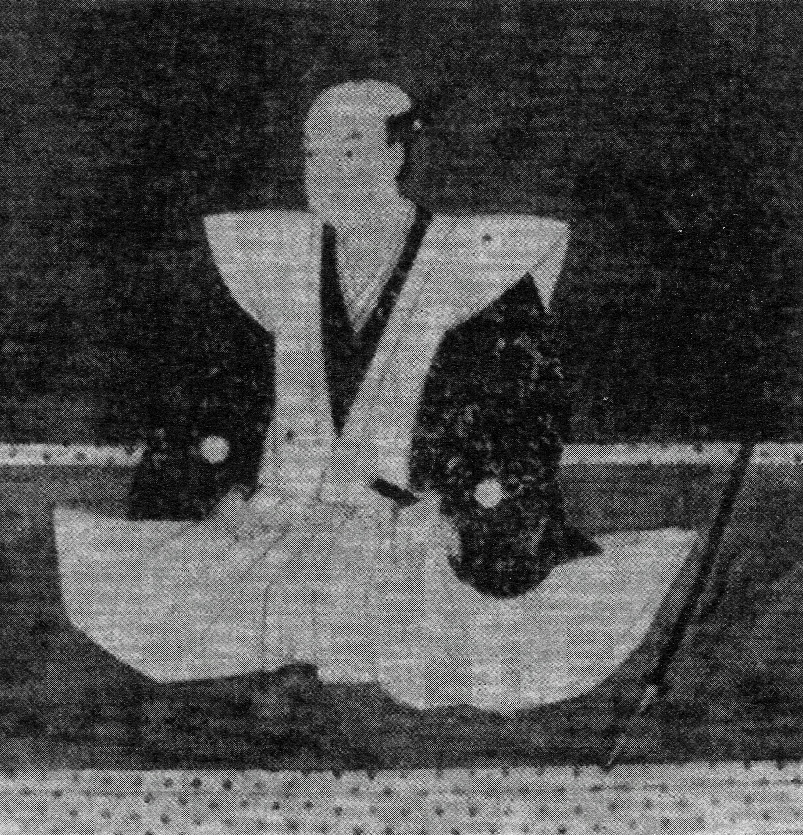 水沢伊達氏4代伊達宗景の肖像画。